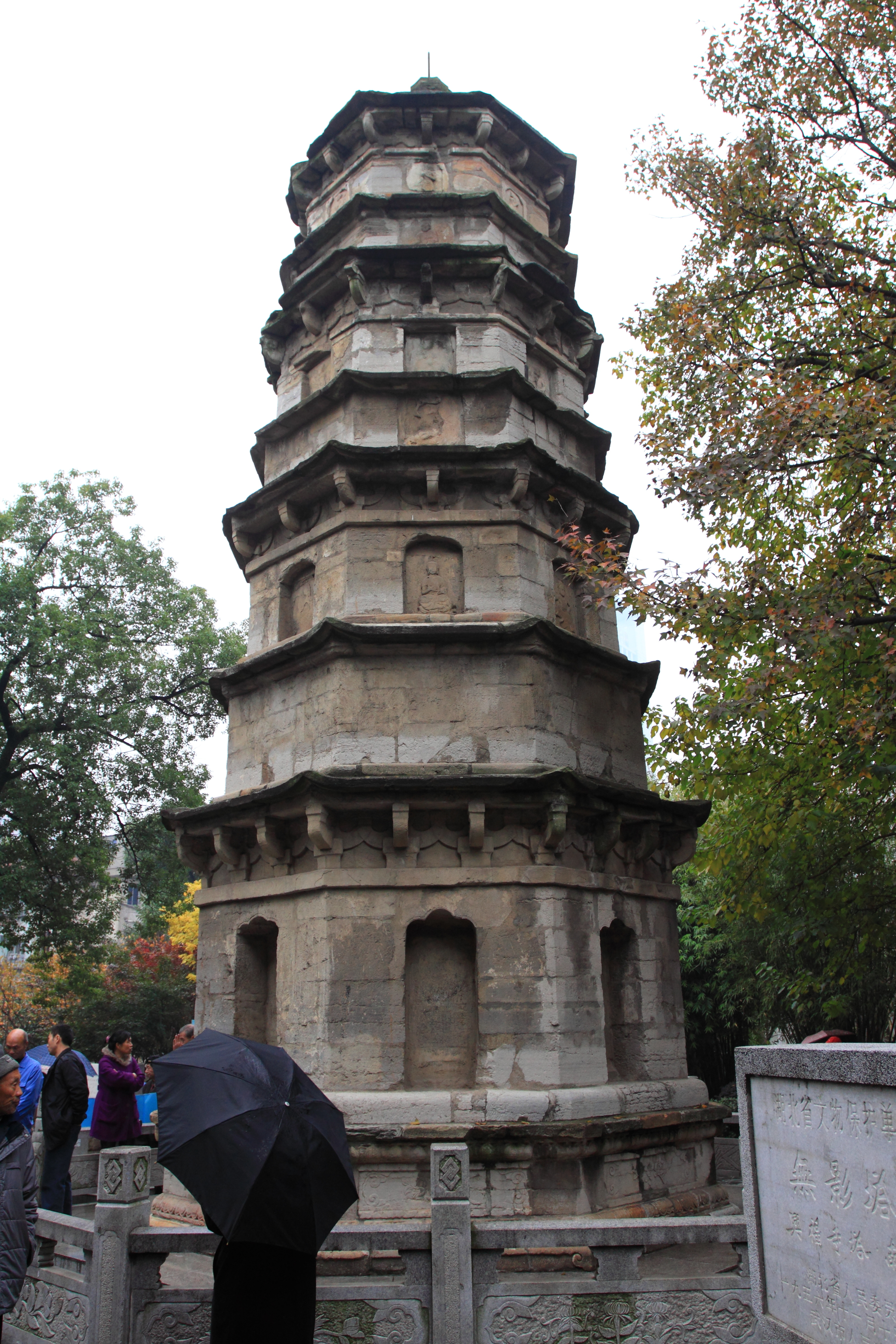 无影塔，位于湖北省武汉市洪山公园，又称兴福寺塔，是全国重点文物保护单位。